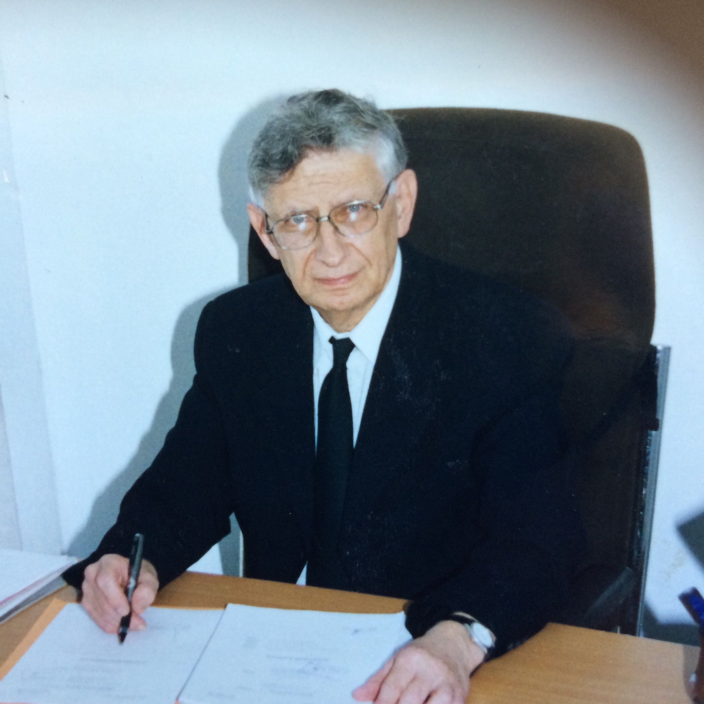 השופט אביגדור משאלי